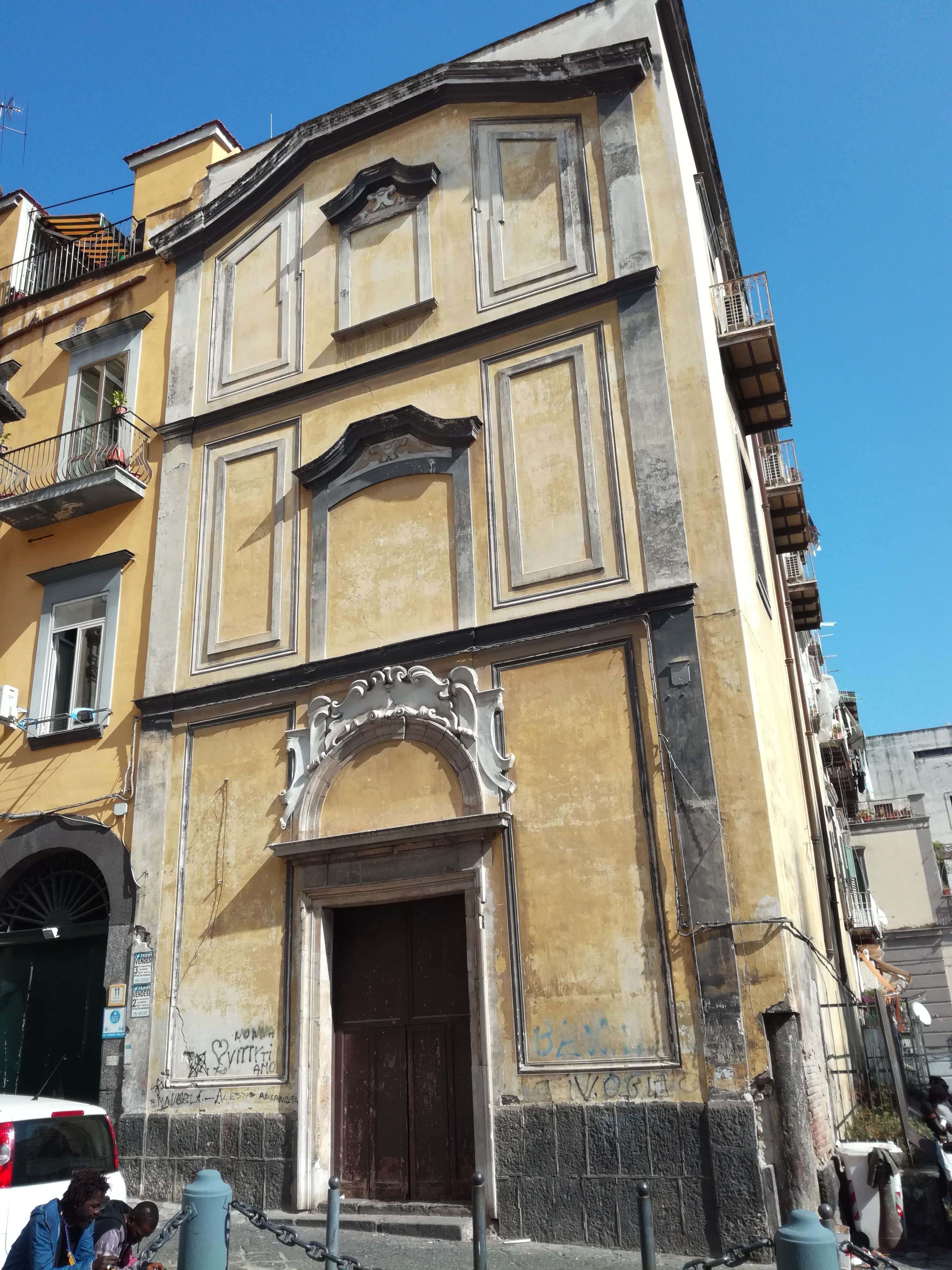 Facciata, Santa Maria Ancillarum